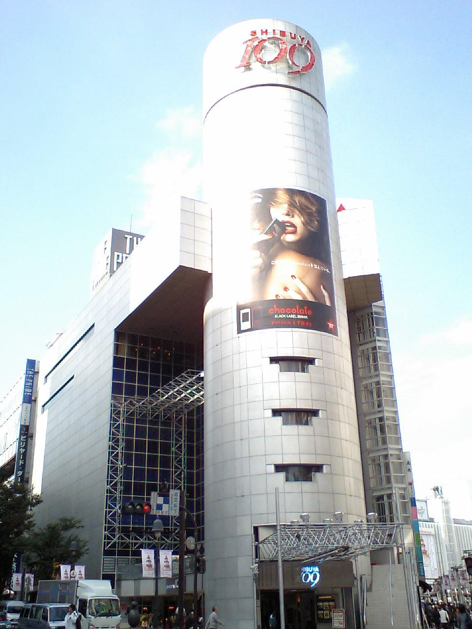 shibuya_109